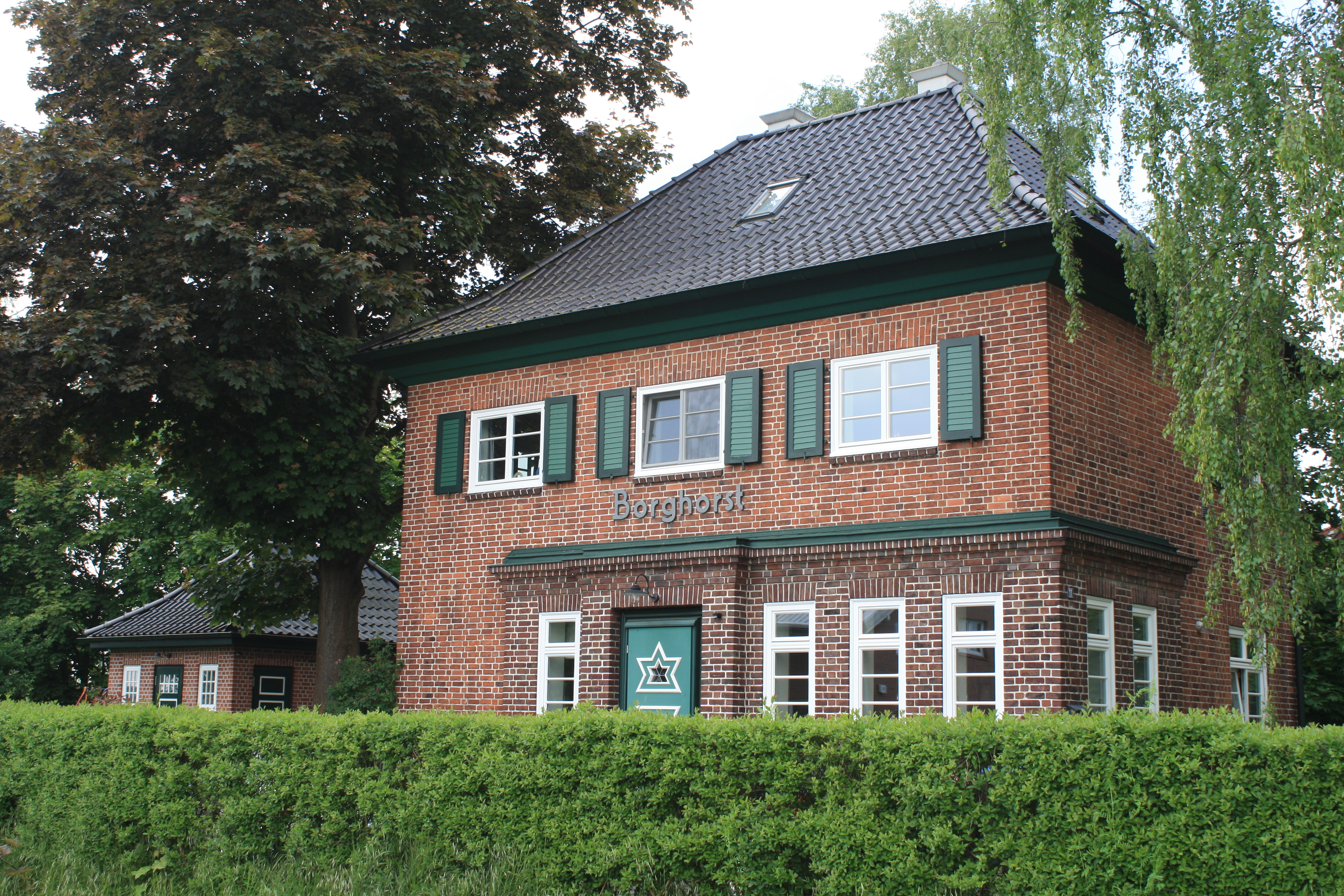 Bahnhofsgebäude Borghorst (Horster Damm 11)